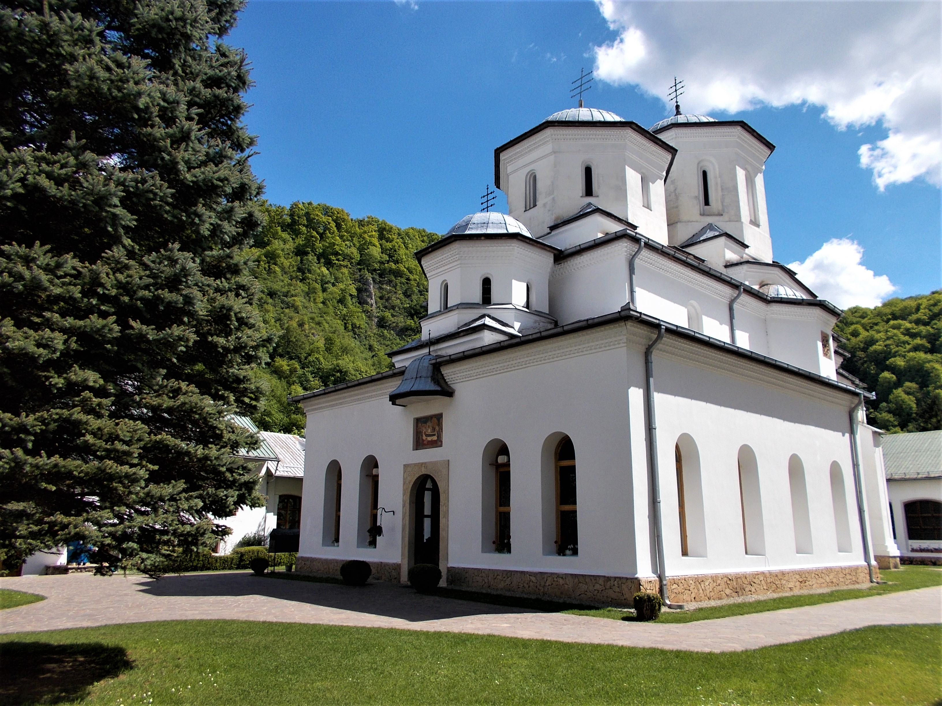 Biserica ”Adormirea Maicii Domnului” (Mănăstirea Tismana) 01